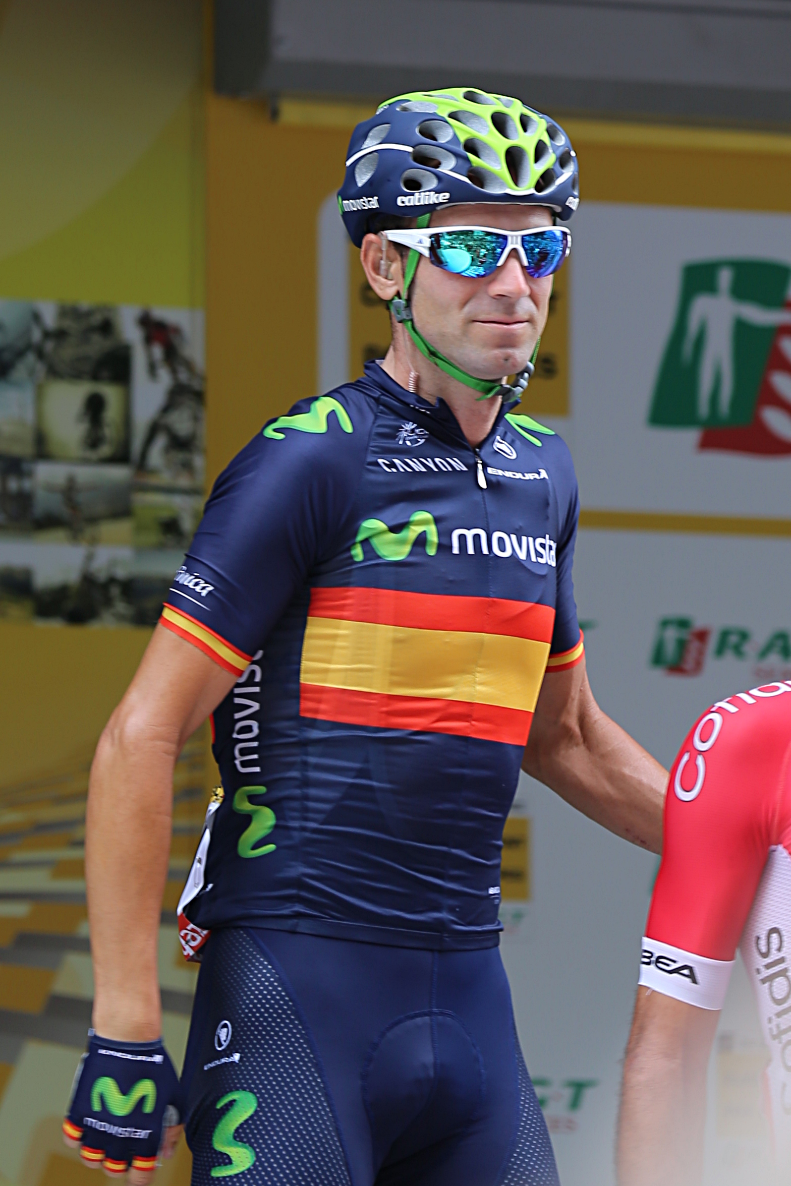 Alejandro Valverde lors du départ de la 8e étape du Tour de France 2015 à Rennes.